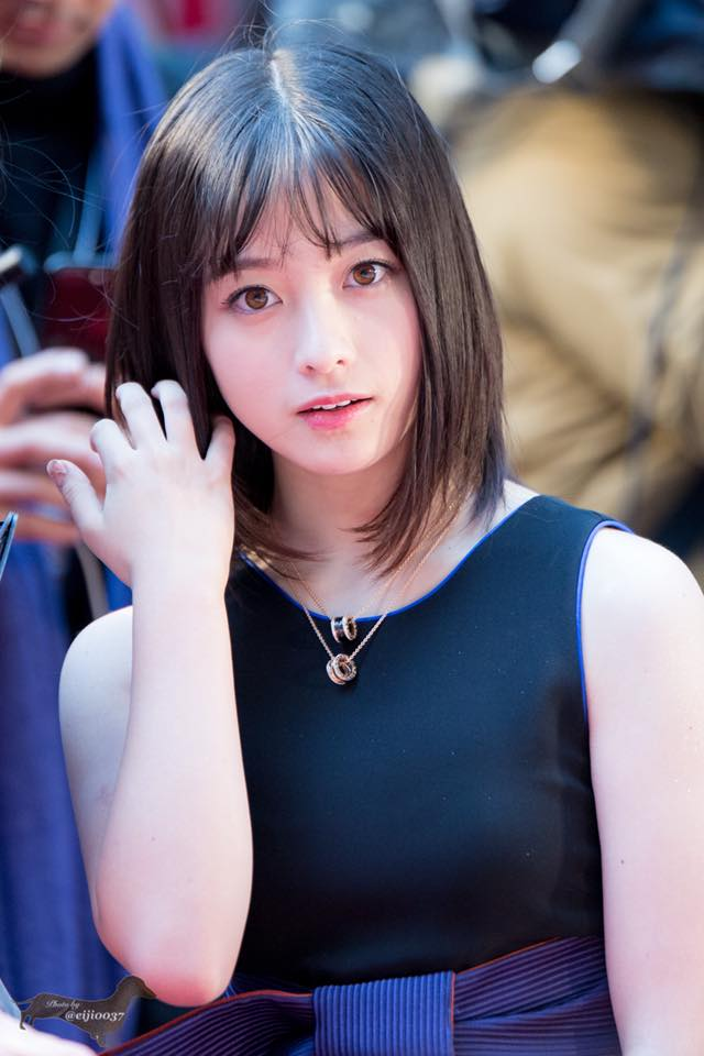 2017年10月25日 東京都港区・六本木ヒルズアリーナで開催された『第30回東京国際映画祭』オープニングセレモニー。被写体：橋本環奈 ／ 撮影者：宗田 英治